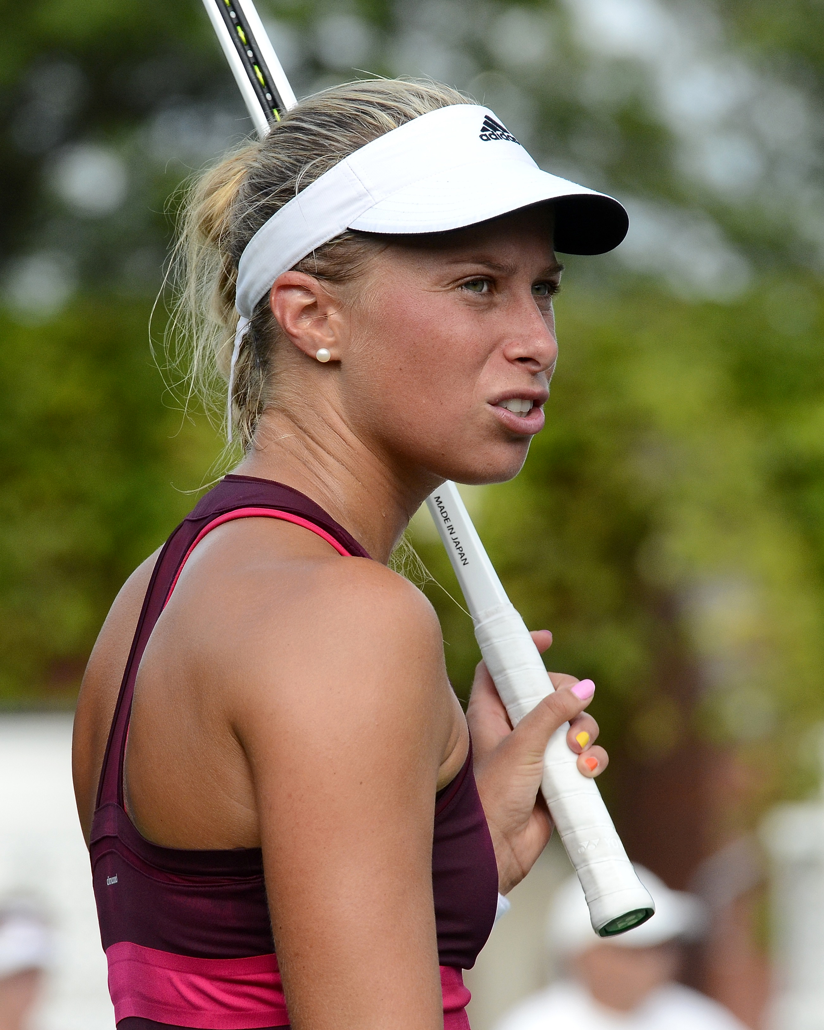 August 21, 2014 Queens, NY Ksenia Pervak (RUS) def. Andrea Hlavackova (CZE)